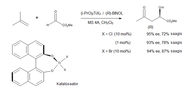 Toolisarnane üleminekuolek pakutud Lewise-happega katalüüsitud een-reaktsioonide jaoks